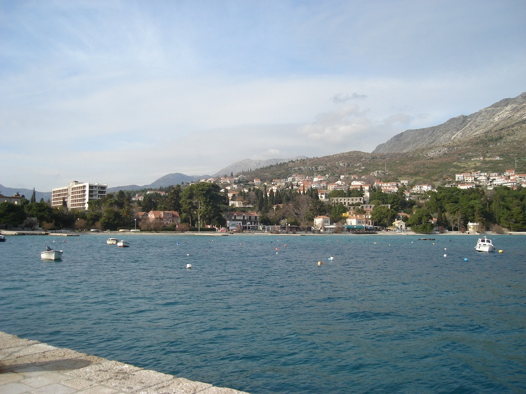 Srebreno